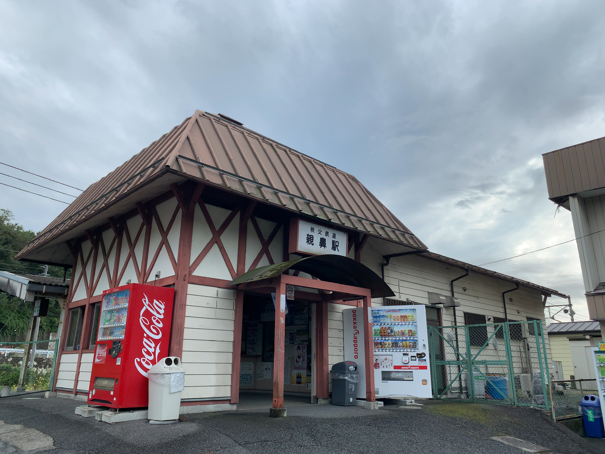 秩父鉄道 親鼻駅 駅舎